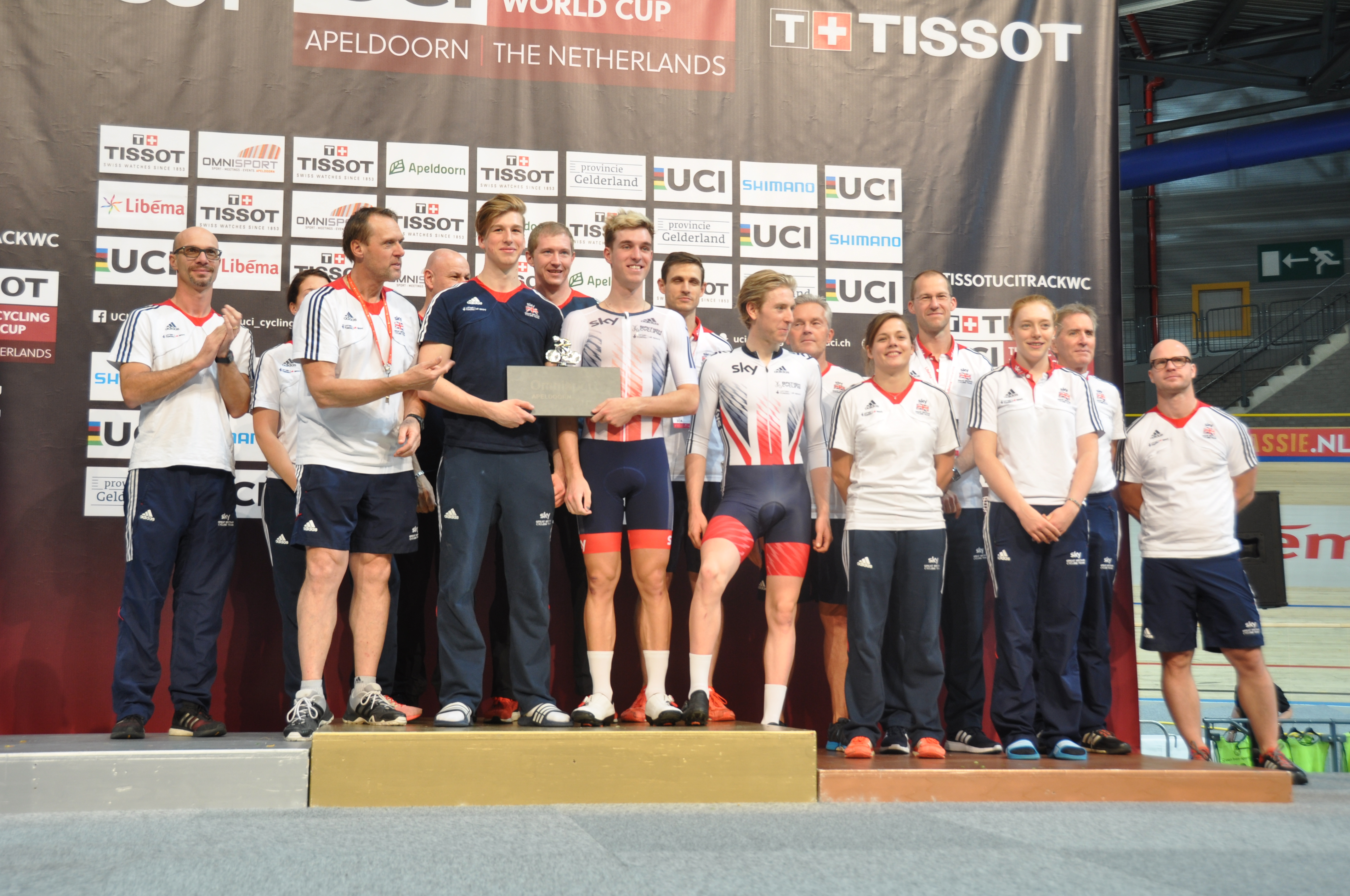 Das siegreiche Team von British Cycling